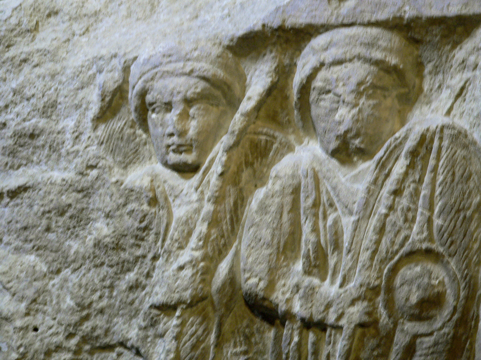 Le pilier des Nautes Musée National du Moyen Age, Thermes de Cluny Source : Clio20